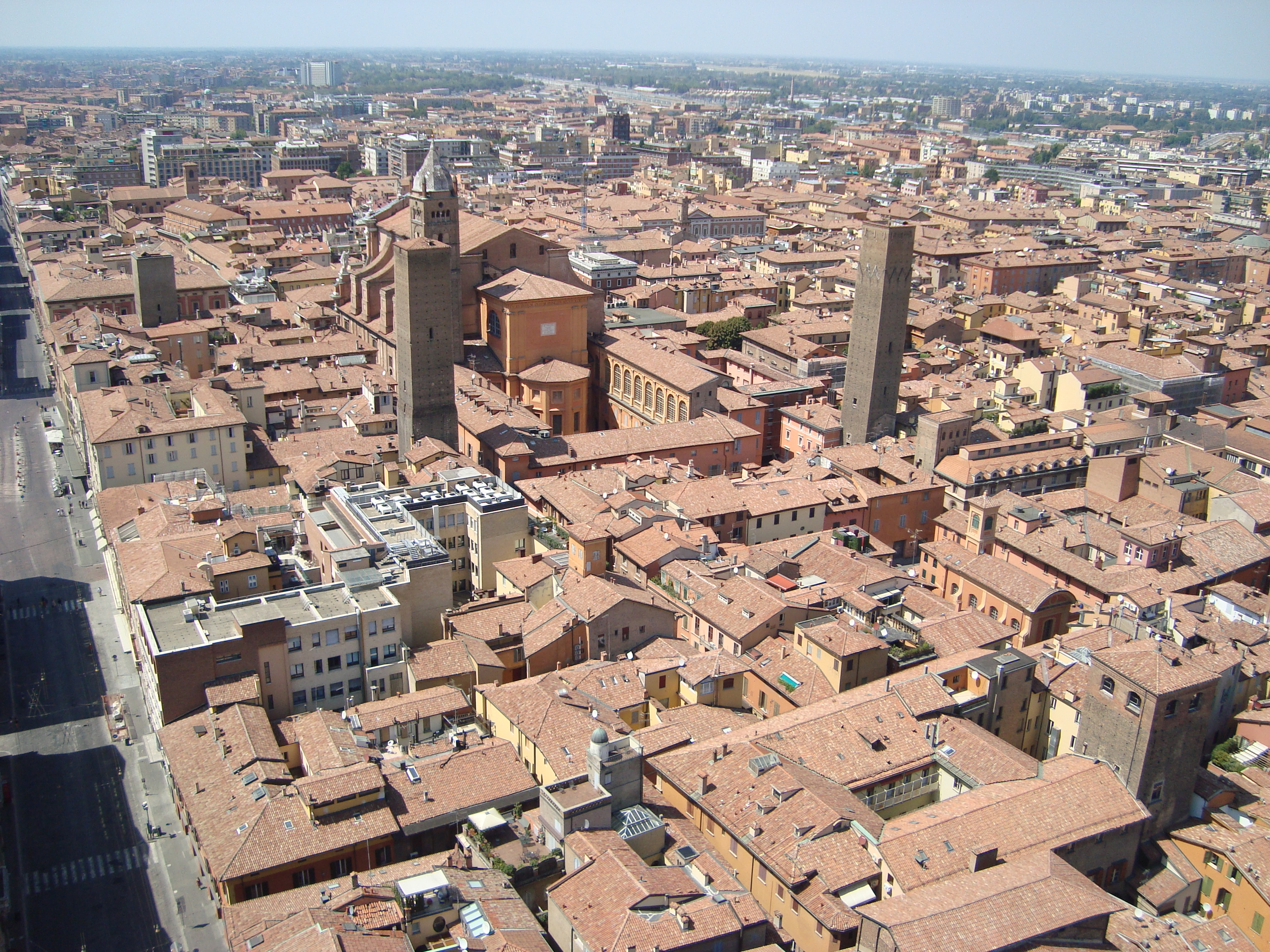 Bologna